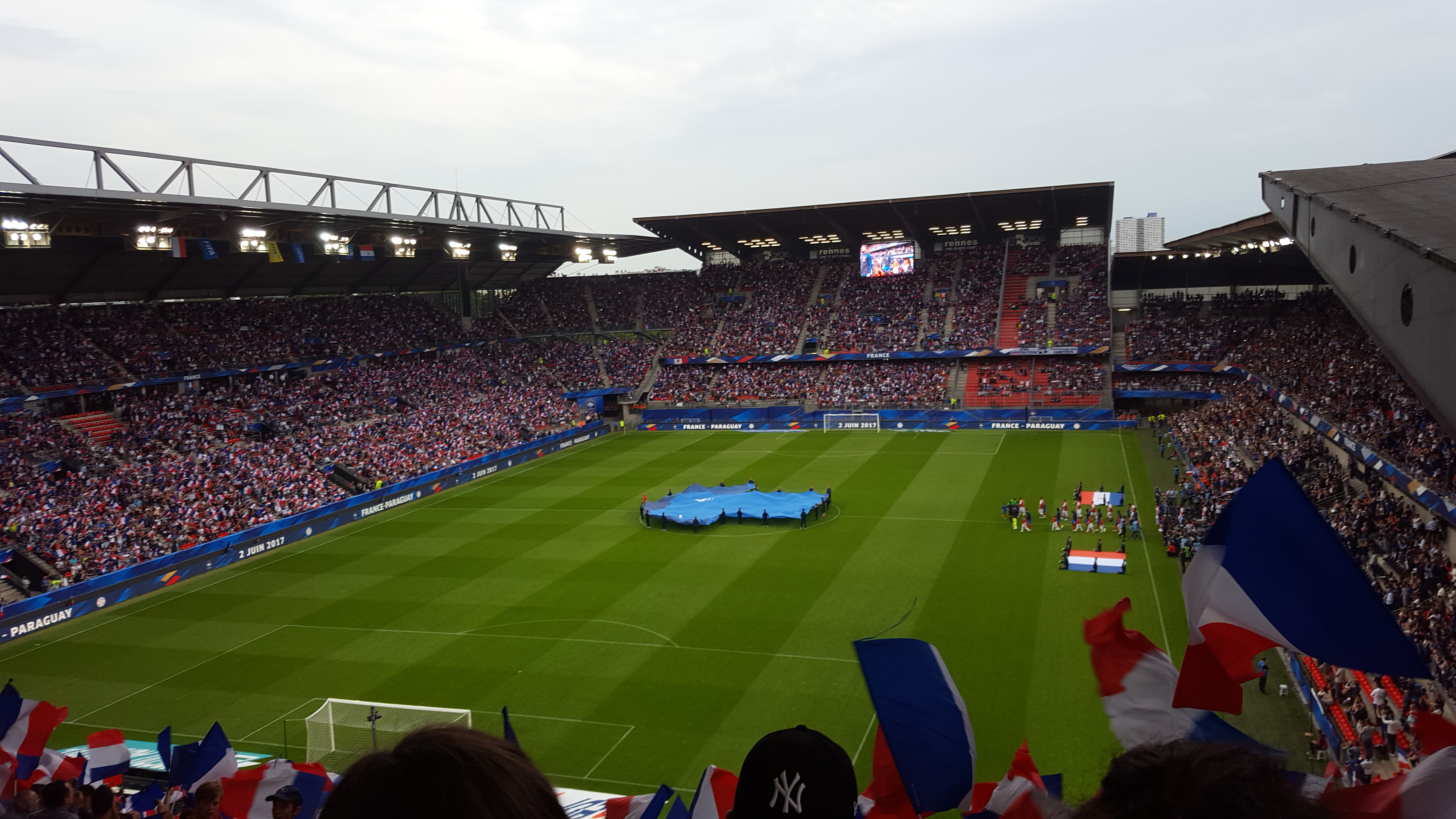 Vue du Roazhon Park avant la rencontre opposant l'équipe de France au Paraguay le 2 juin 2017.